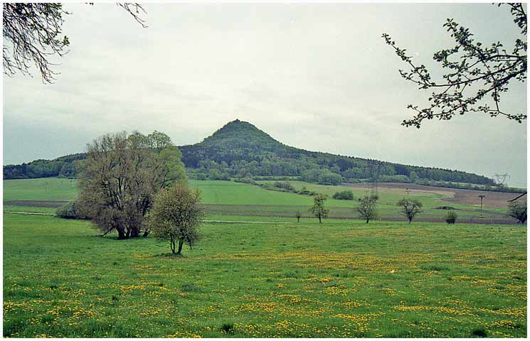 Fotografie vrchu Ronov u České Lípy z mého archivu. Pohled na vrch Ronov od Stranného.